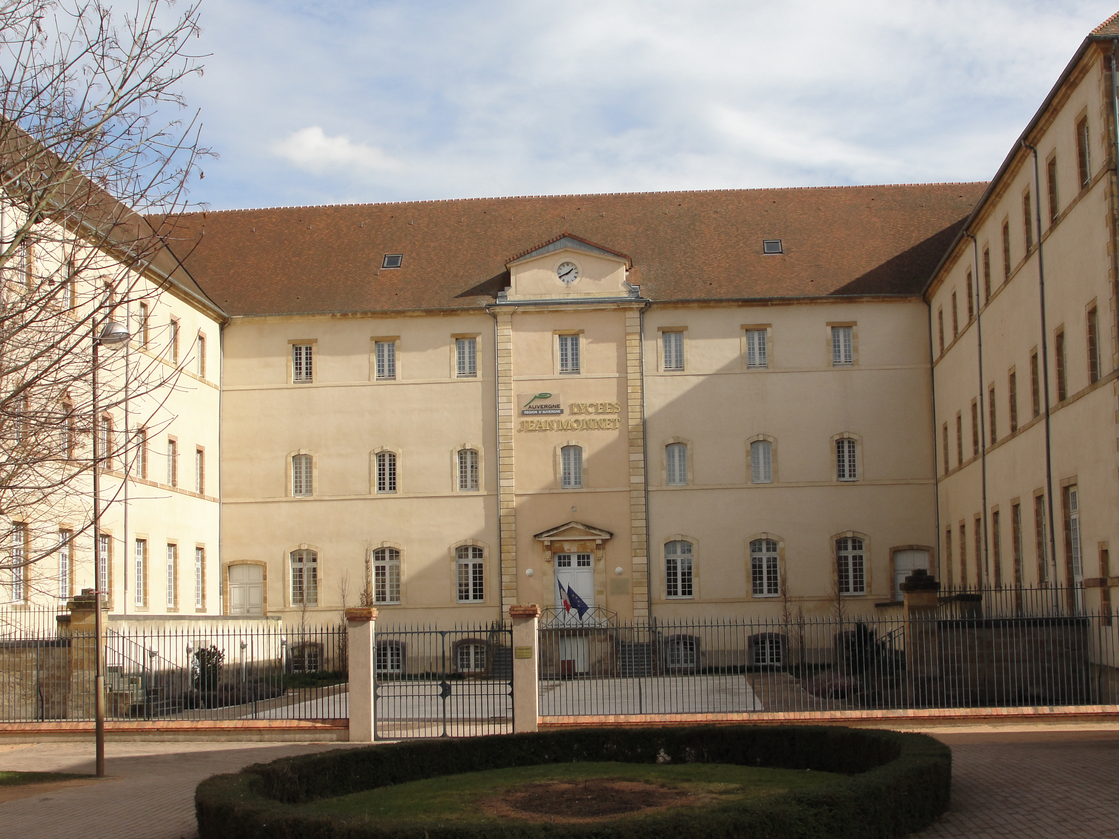 façade d'une partie du campus Jean Monnet d'Yzeure, Auvergne - France